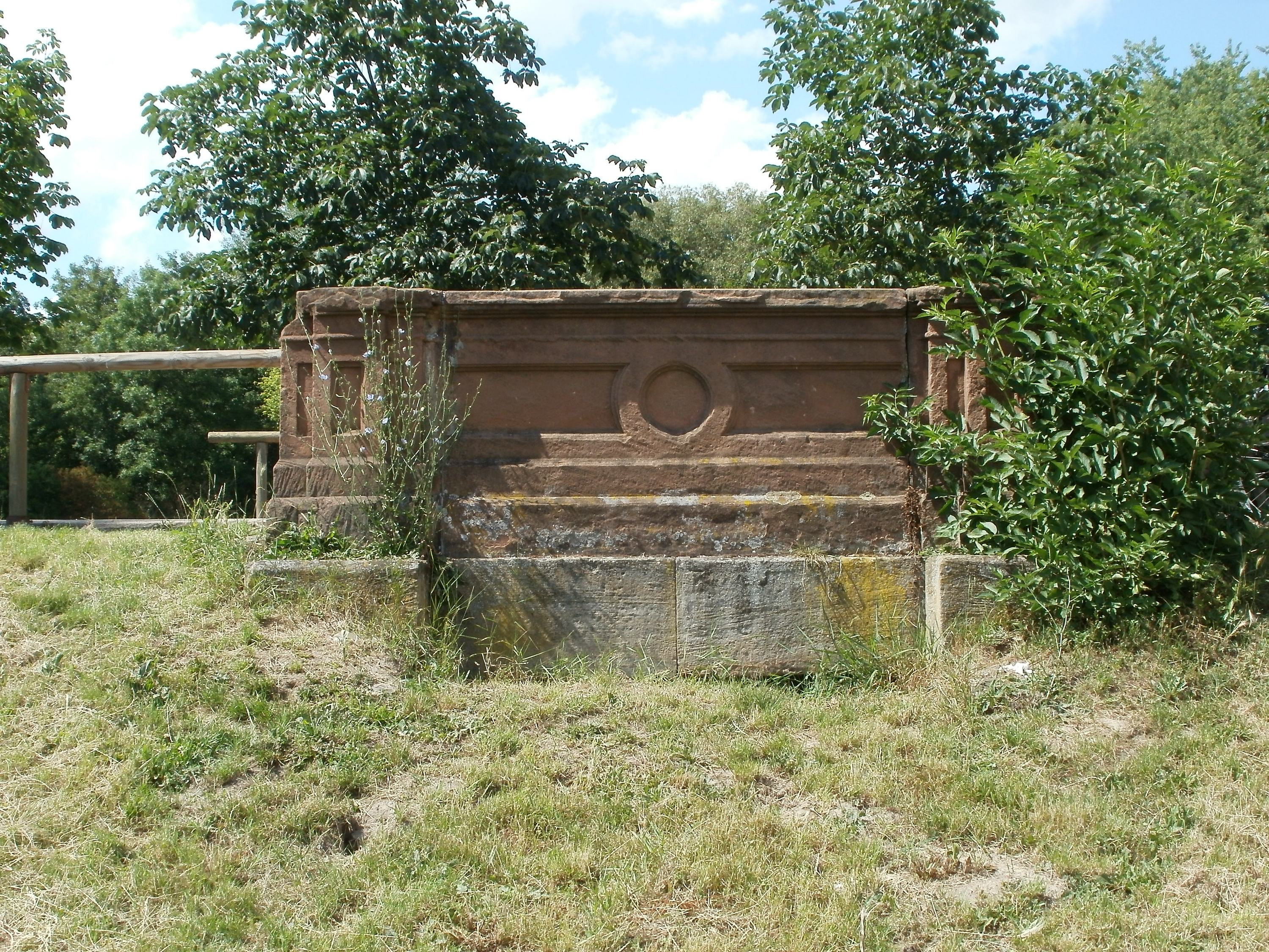 ehemalige Brücke am früheren Bahndamm zur Rheinbrücke in Speyer